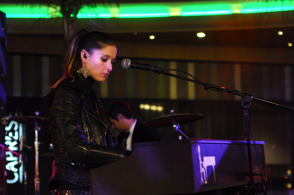 Miércoles 6 de Mayo. Mirador de Alto Las Condes